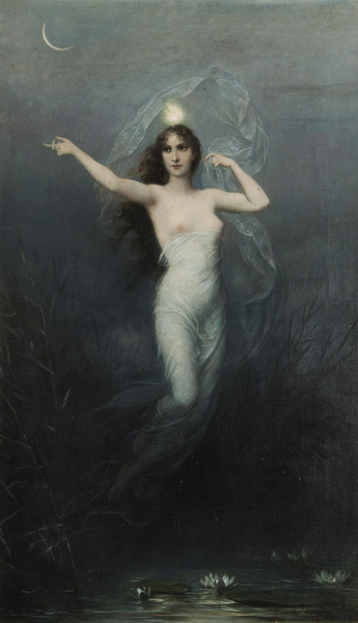 Luna